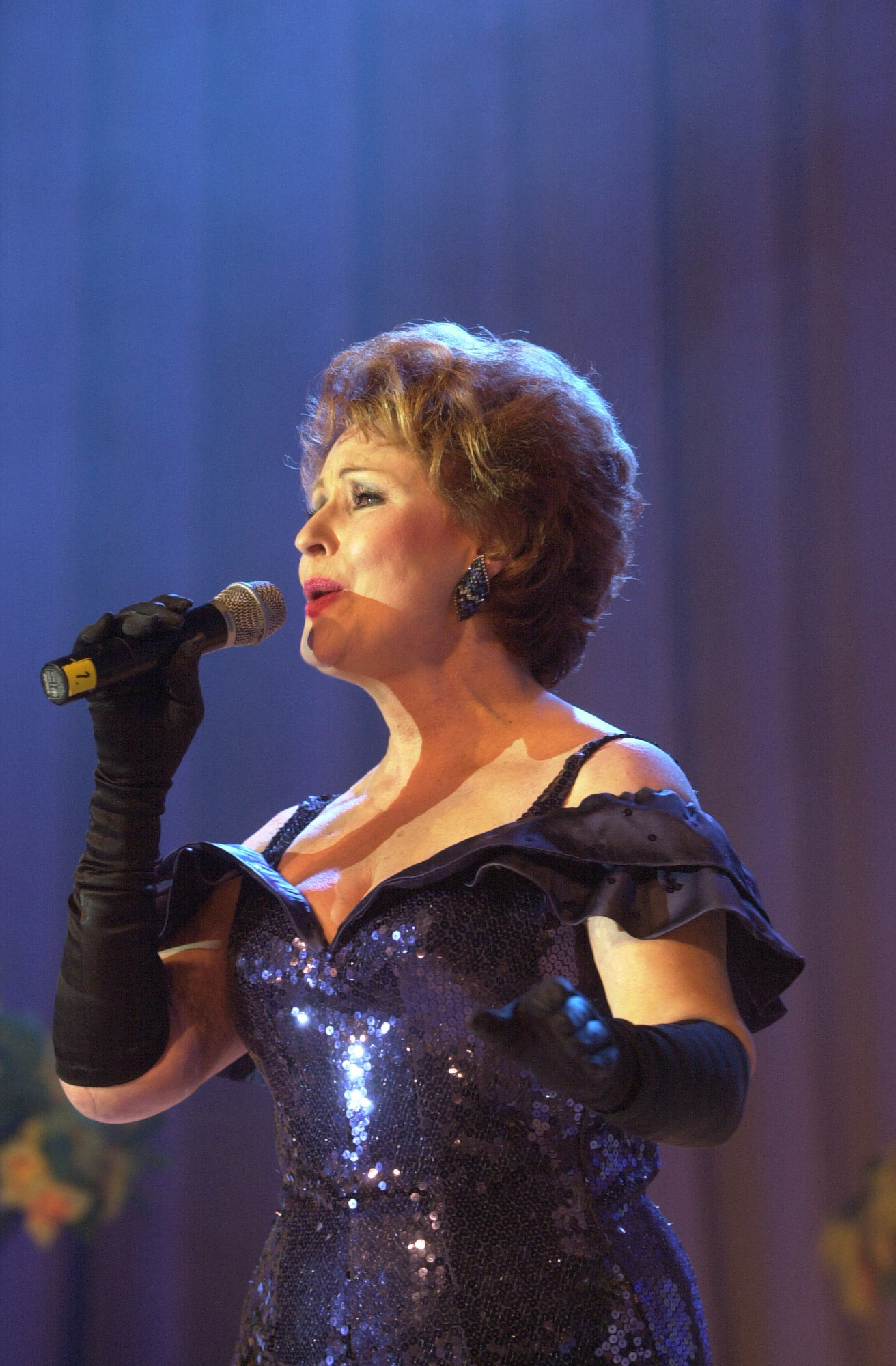 Tamara Lund bei einer Gala in Tampere, 16.08.2001